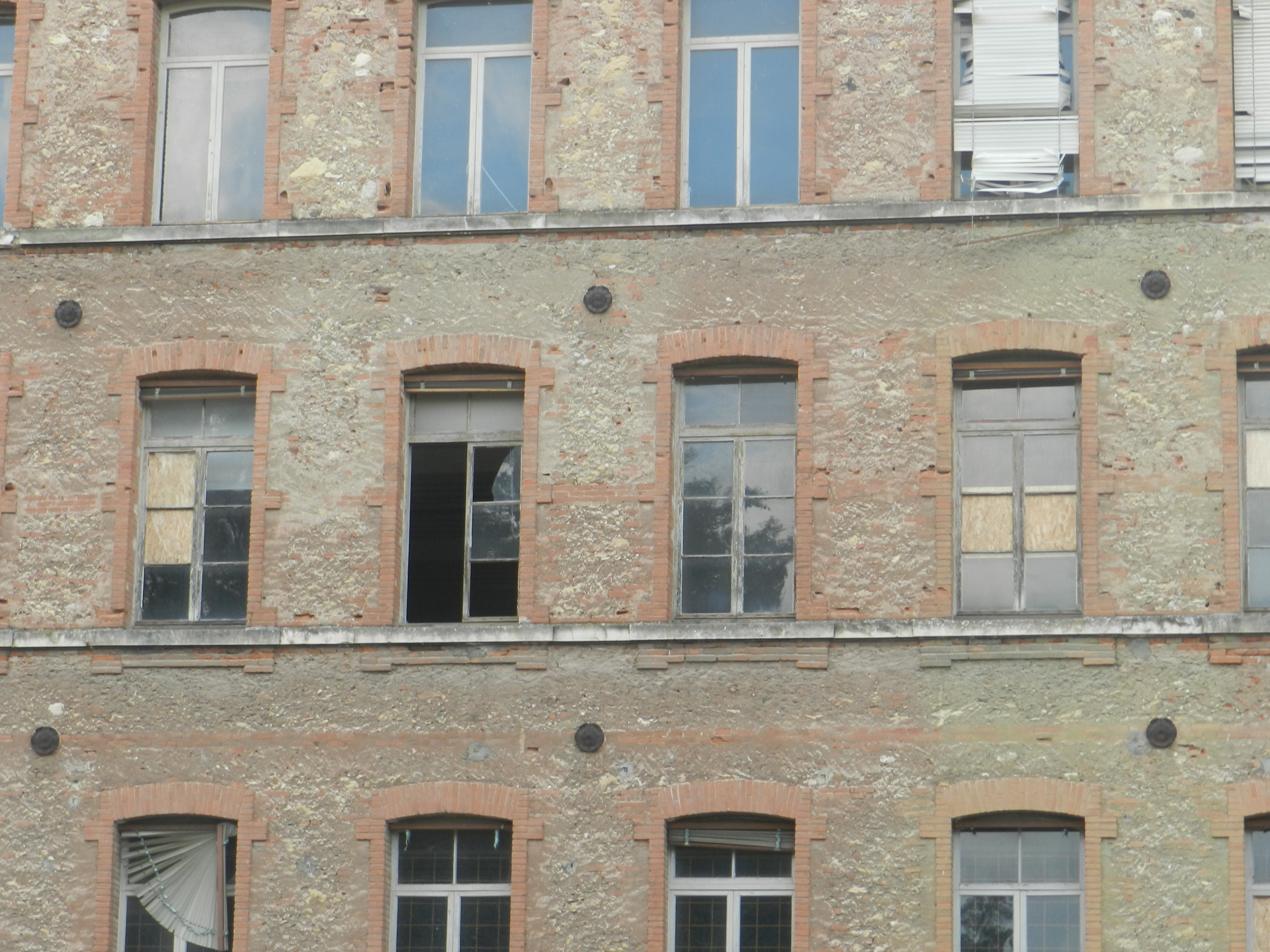 Edificio "Fabbrica Alta" - Area ex Lanerossi This is a photo of a monument which is part of cultural heritage of Italy.